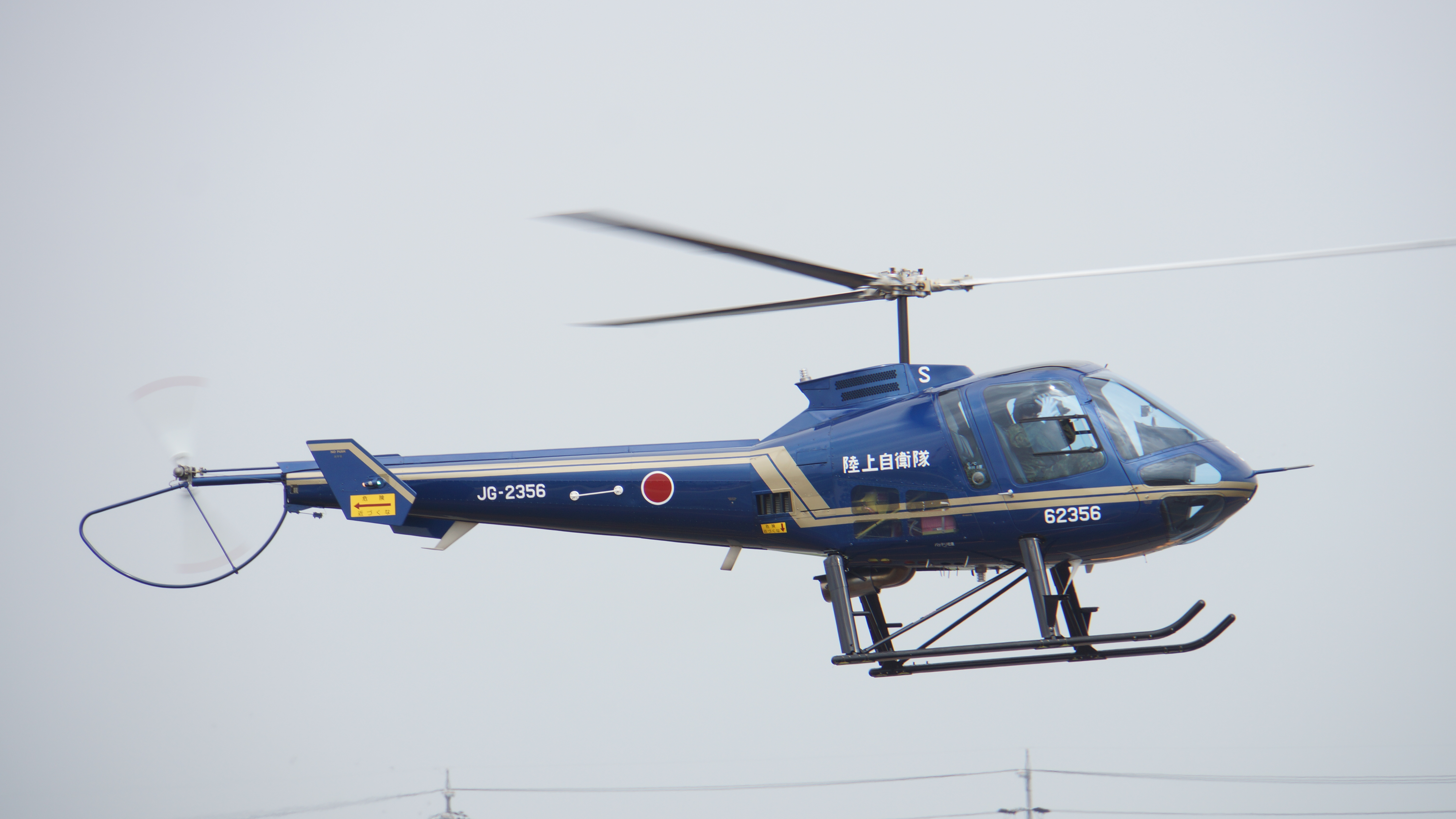 陸上自衛隊 TH-480B練習ヘリコプター（62356号機）。2016年10月2日 明野駐屯地にて。